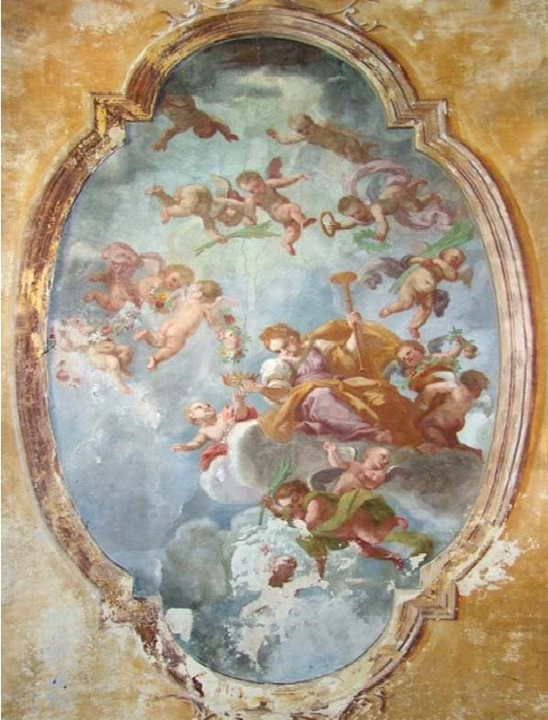 Affresco di un soffitto di Villa Venini a Vittuone (MI) - da restaurare